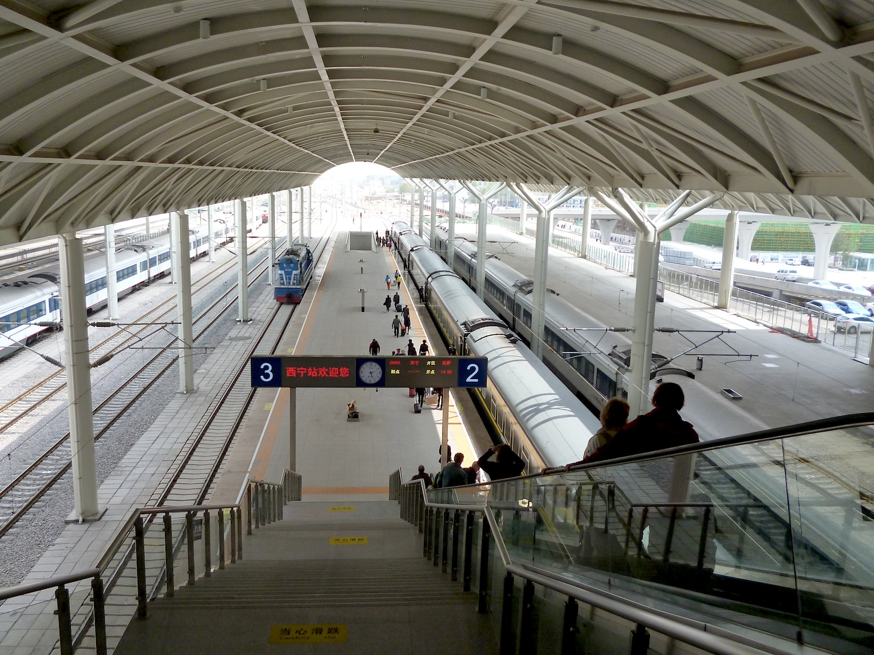 Ansicht des neuen Bahnhofs in Xining, China